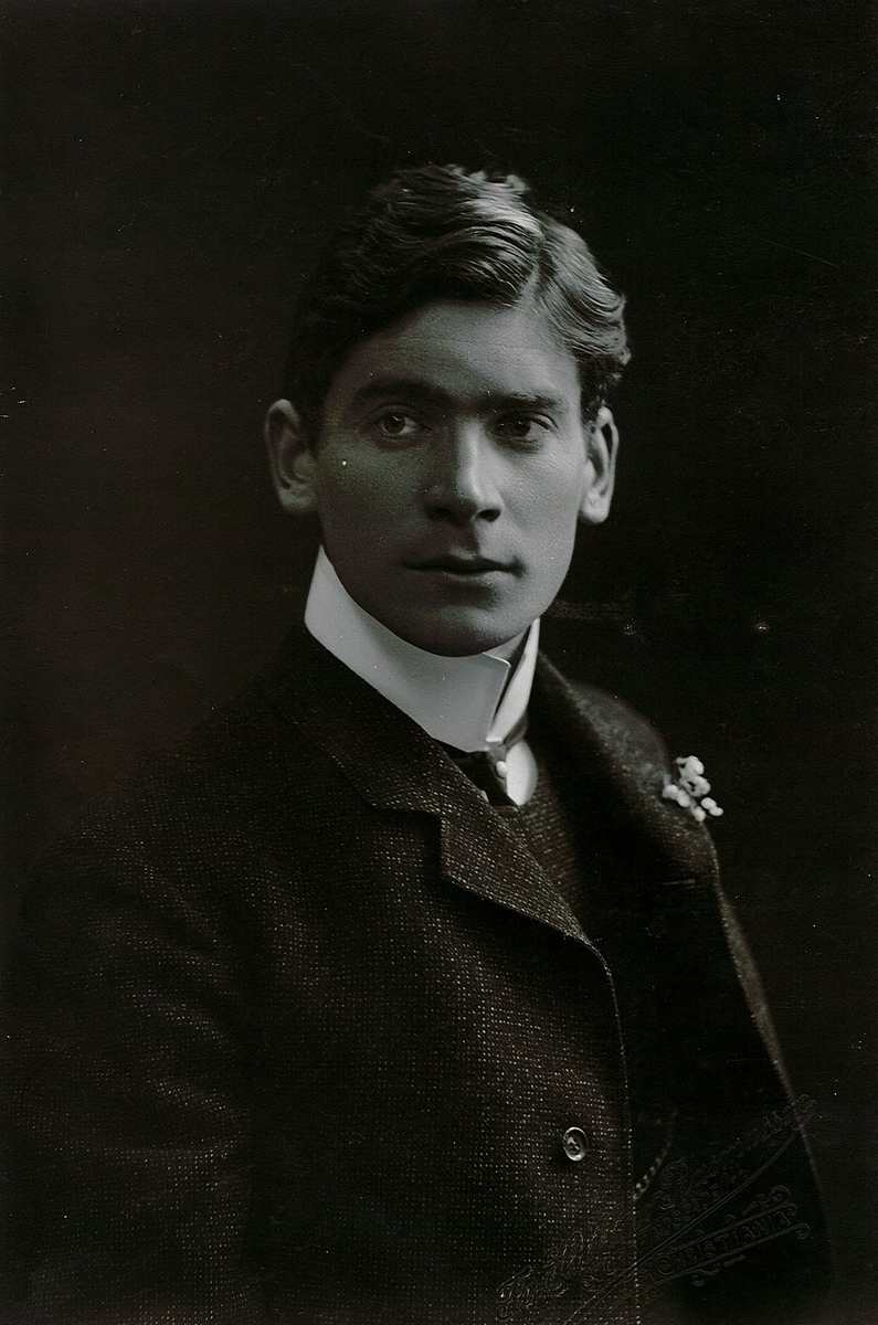 Portrett av August Oddvar (1903).